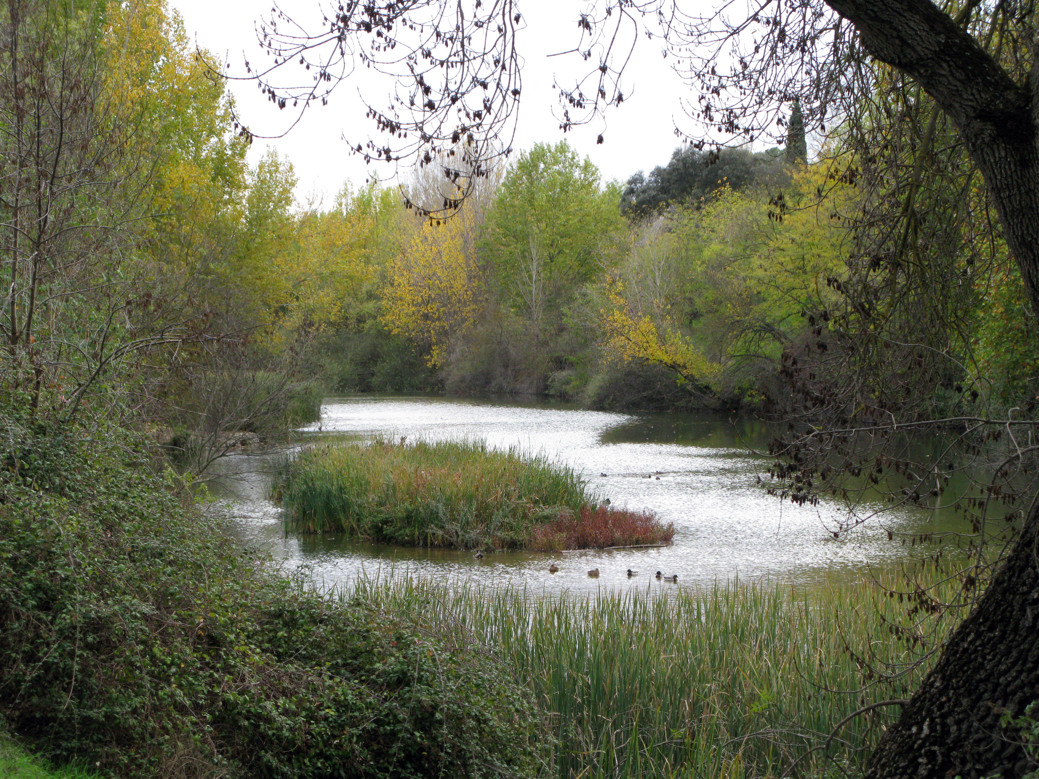 Cuenca del río Manzanares- Monte del Pardo This is a photography of a Special Area of Conservation in Spain with the ID: ES3110004. Natura2000 entry, EEA entry